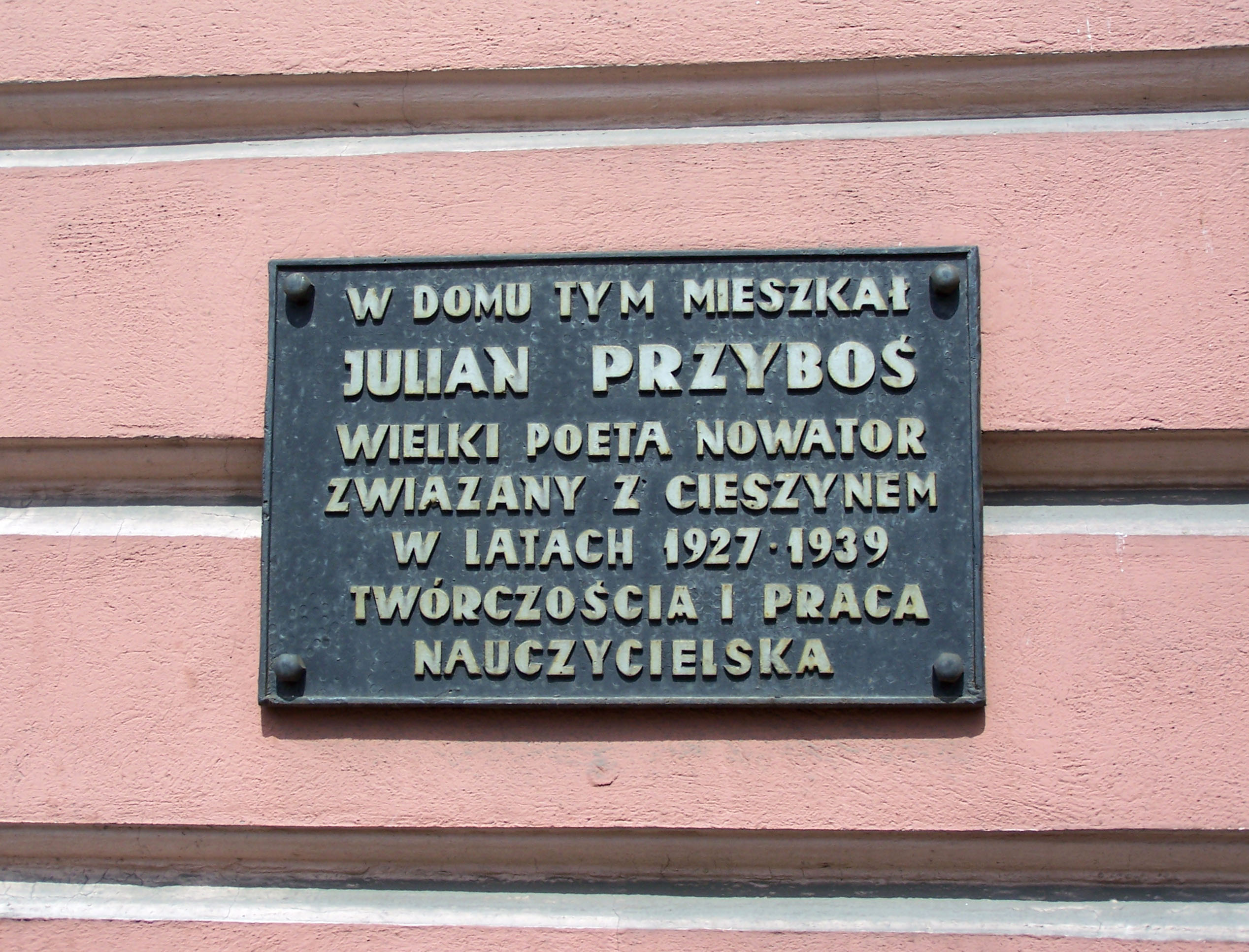 Memorial plaque to poet Julian Przyboś in Cieszyn, Poland